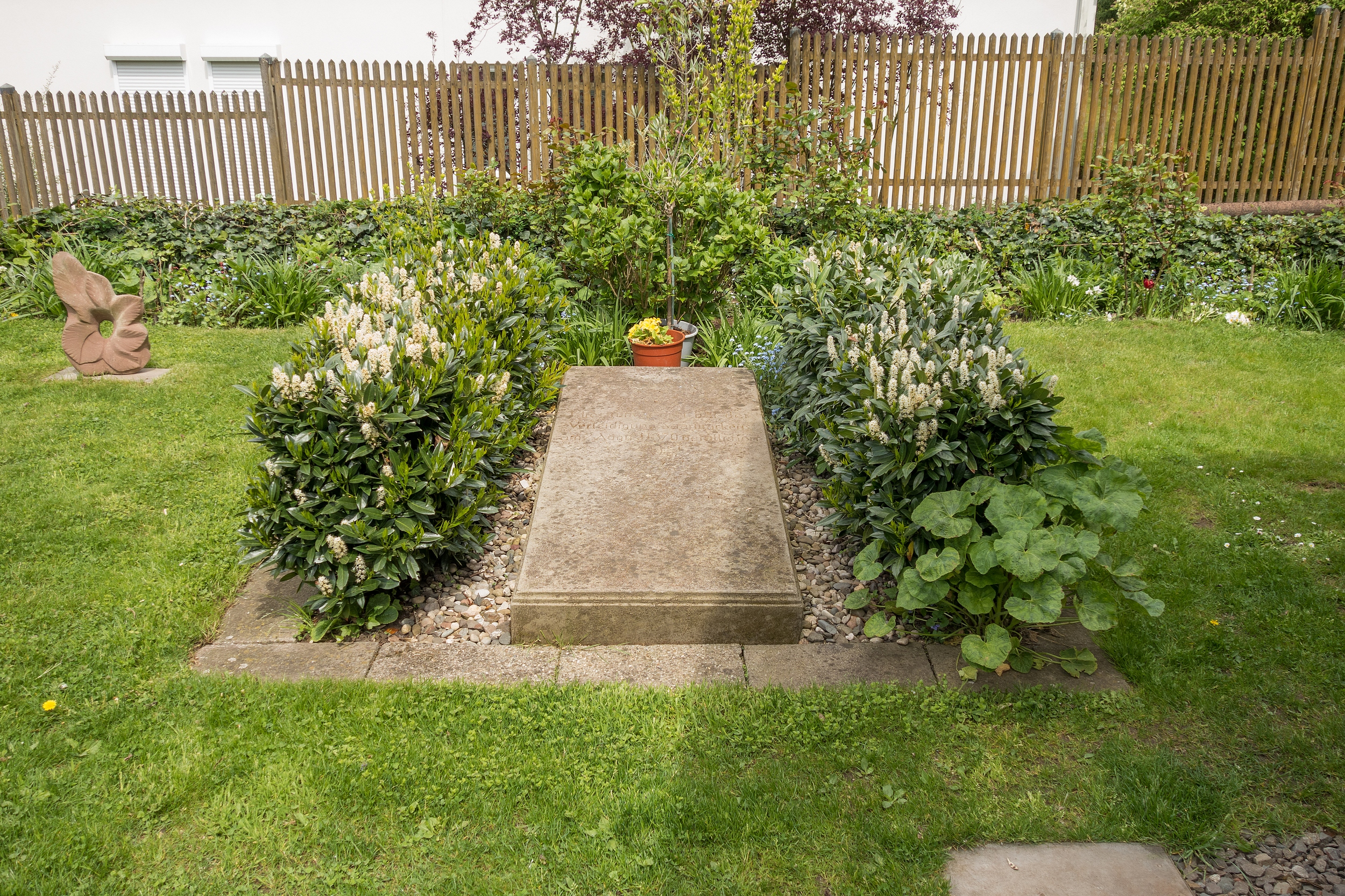 Das 40er Grab an der Notkirche in Alt-Saarbrücken. Hier liegen die ersten bei der Schlacht um die Spicherer Höhen im Jahr 1870 getöteten Füsiliere.